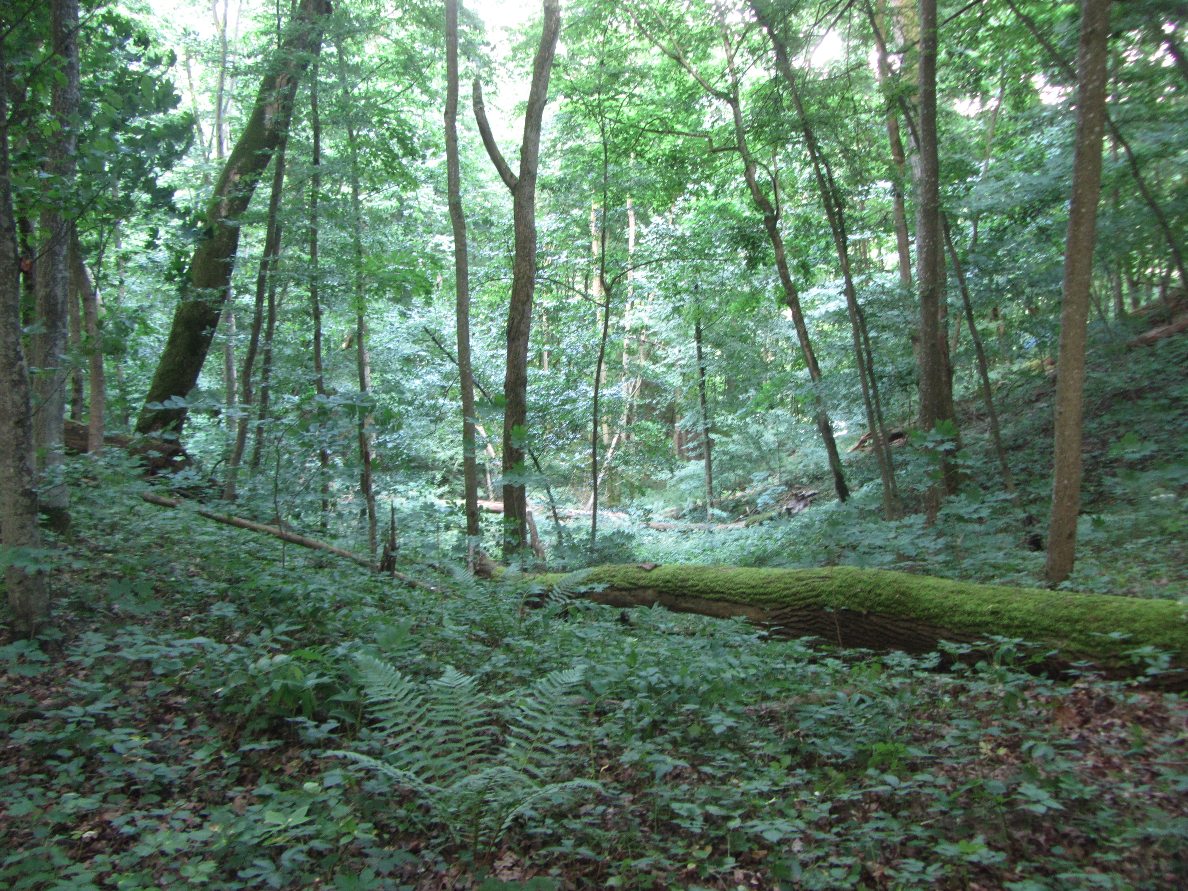 Alytus, Lithuania